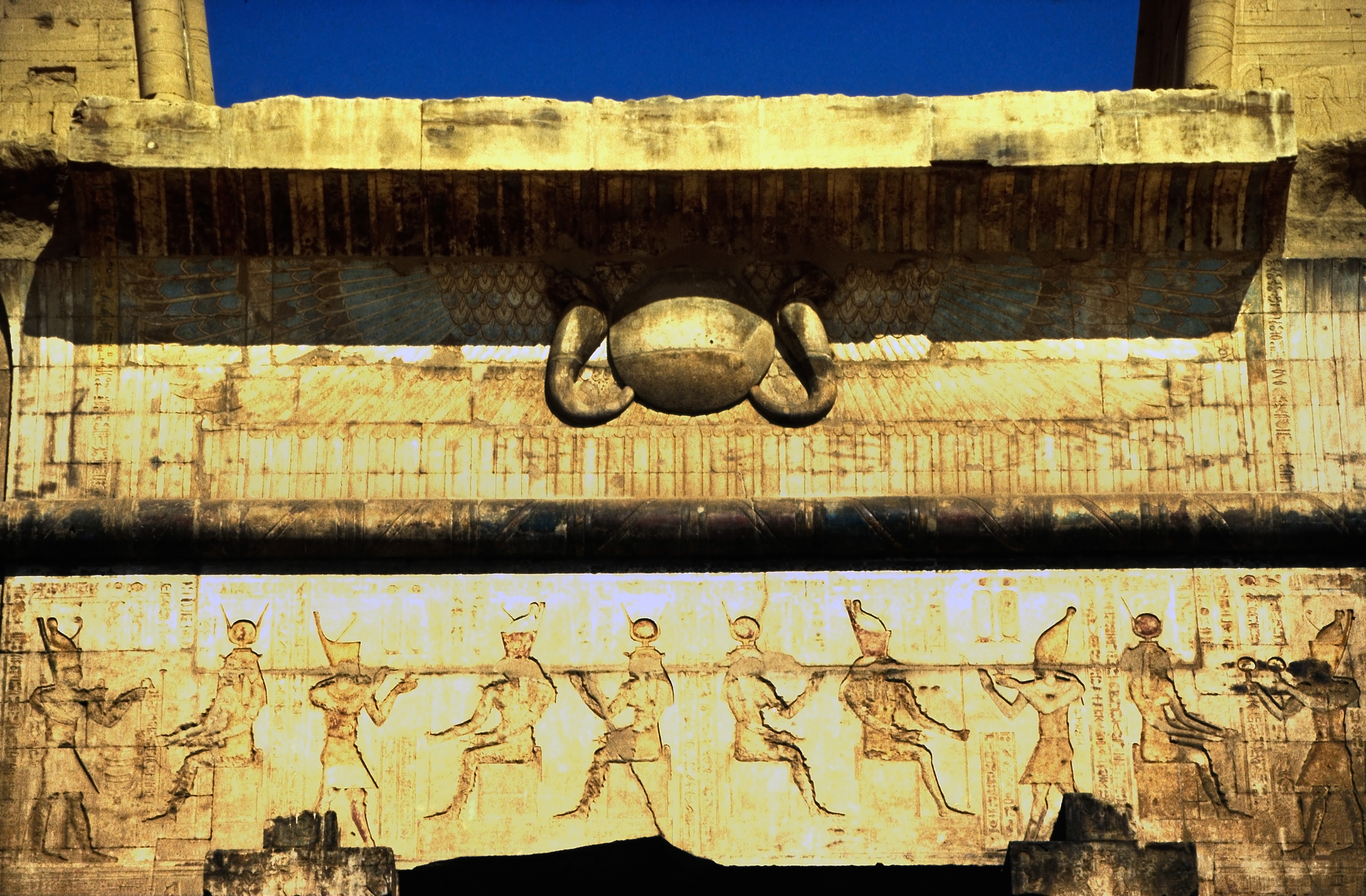 Friese über dem Portal des Tempels von Edfu,.